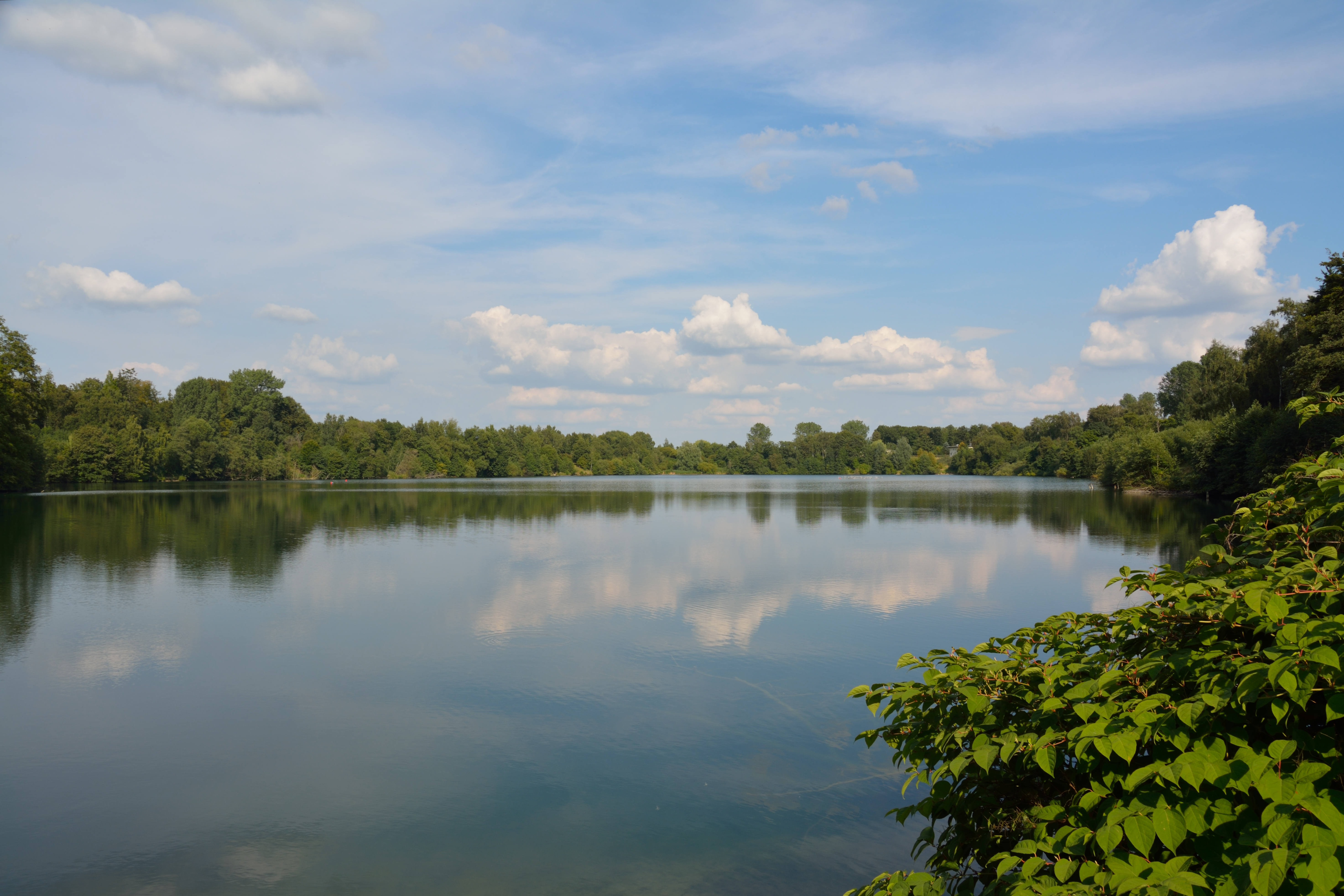 Blick auf Alsens Tongrube von der westlichen Badestelle